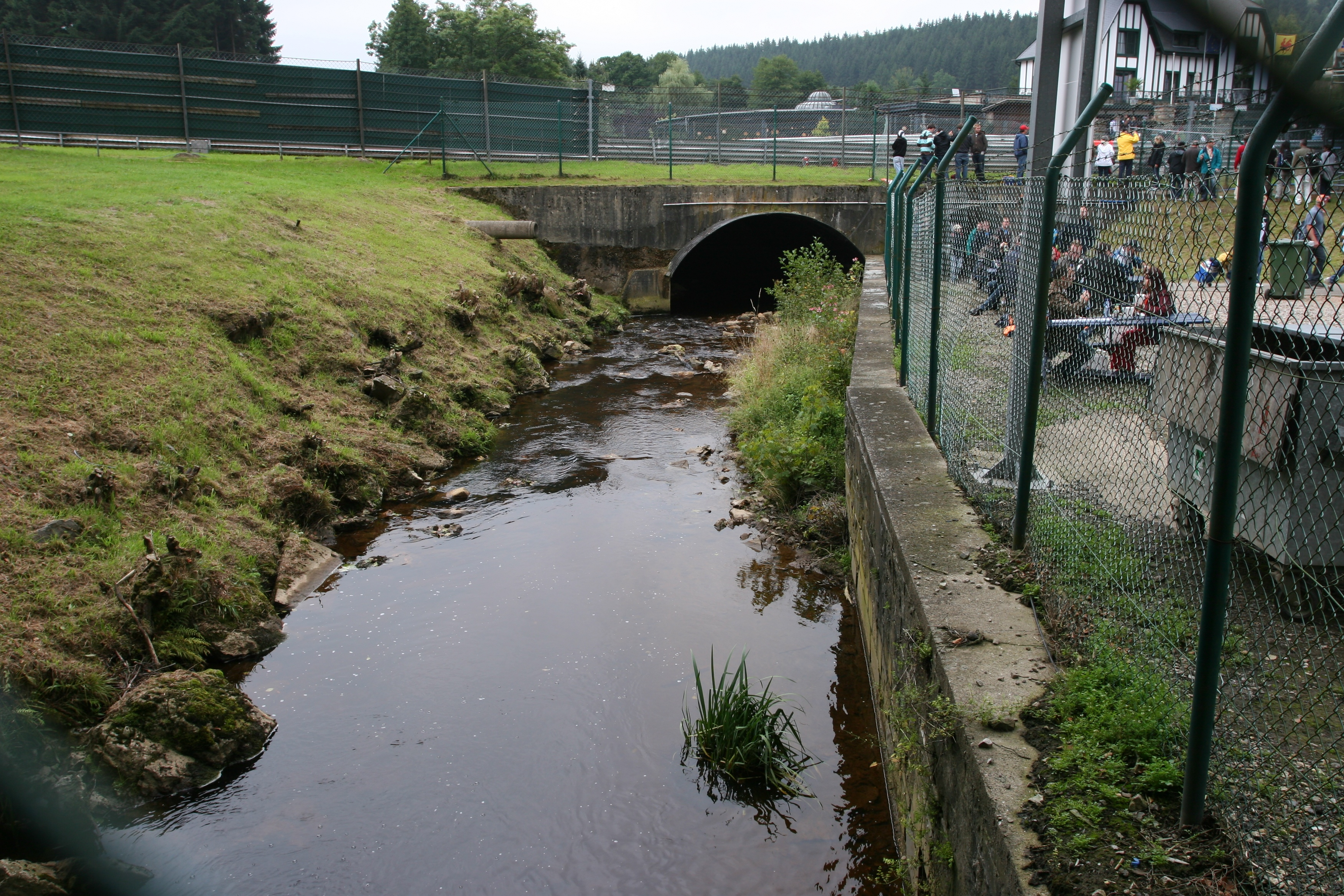 Arrollo Eau Rouge, en Spa